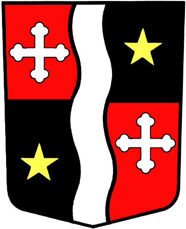 Wappen von Vernayaz Kanton Wallis Schweiz